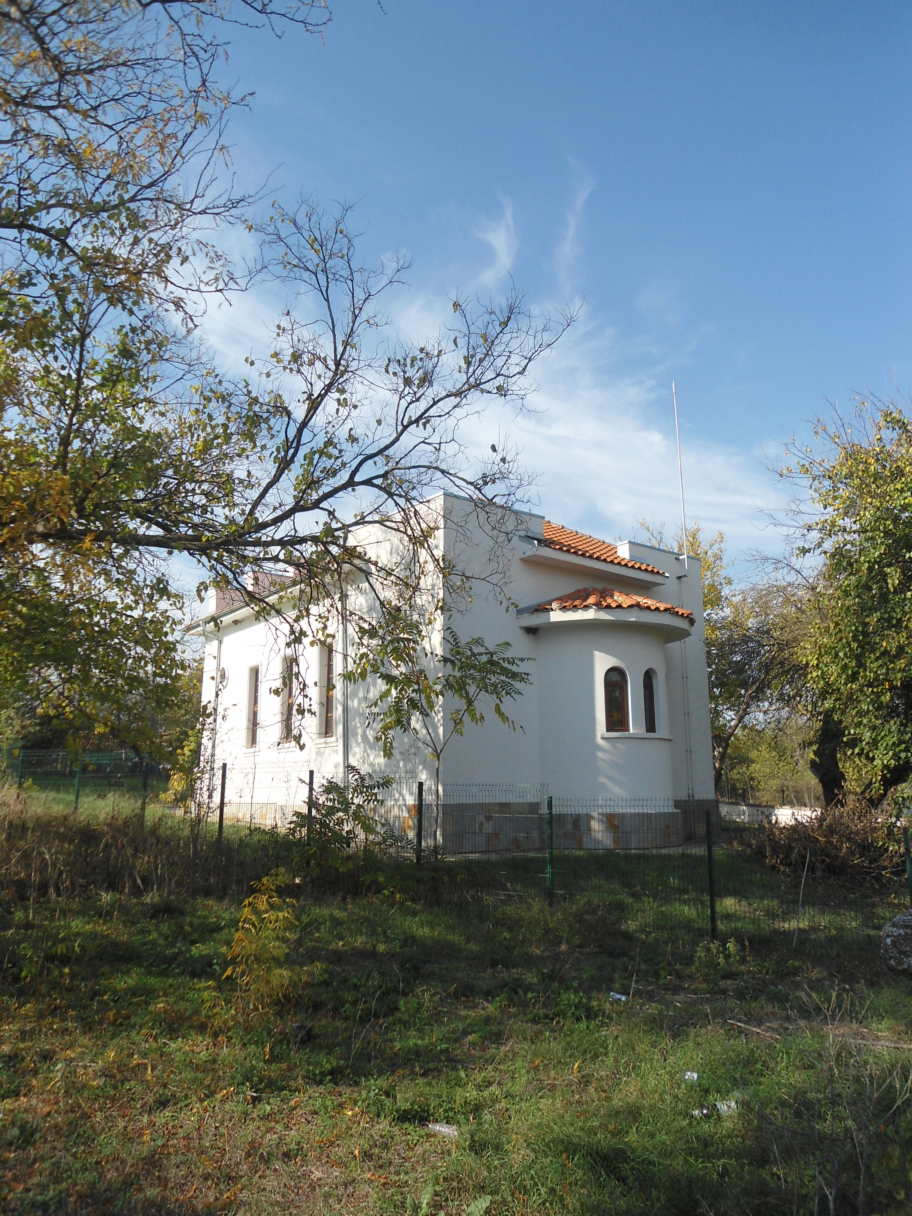 Църквата „Св. Архангел Михаил“ в с. Трънково (общ. Елхово).